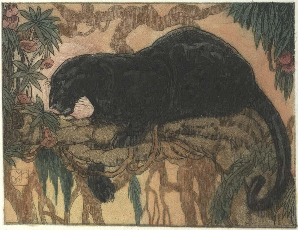 Illustration du Livre de la jungle de Kipling.